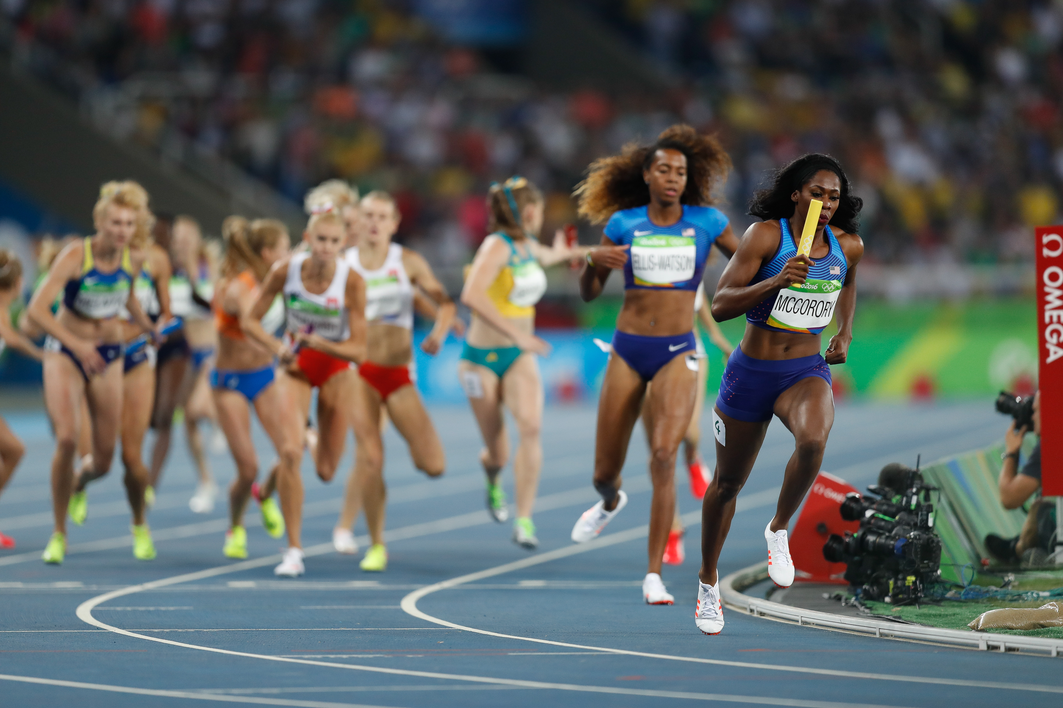 Rio de Janeiro - Eliminatórias do revezamento 4 x 400m nos Jogos Rio 2016, no Estádio Olímpico (Fernando Frazão/Agência Brasil)